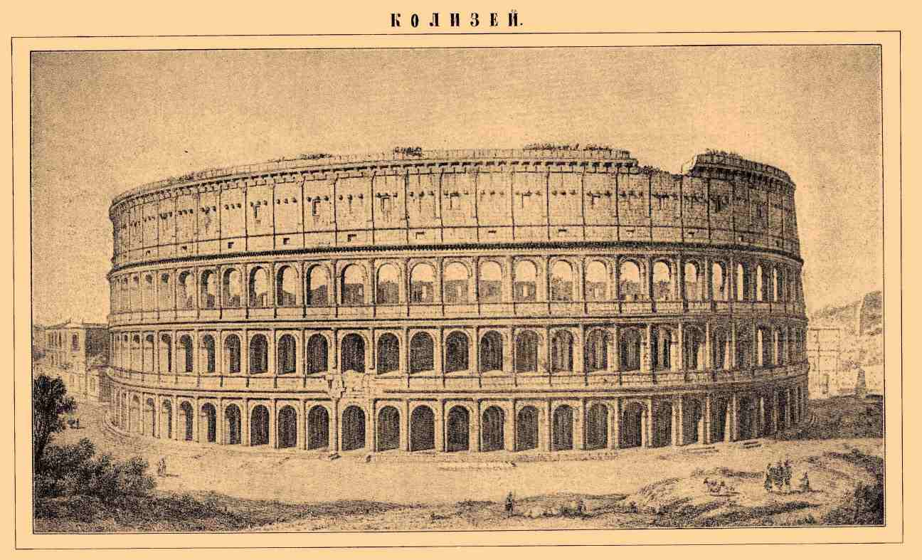 Описание - Колизей Источник - Энциклопедический словарь Брокгауза и Ефрона (1890—1907)